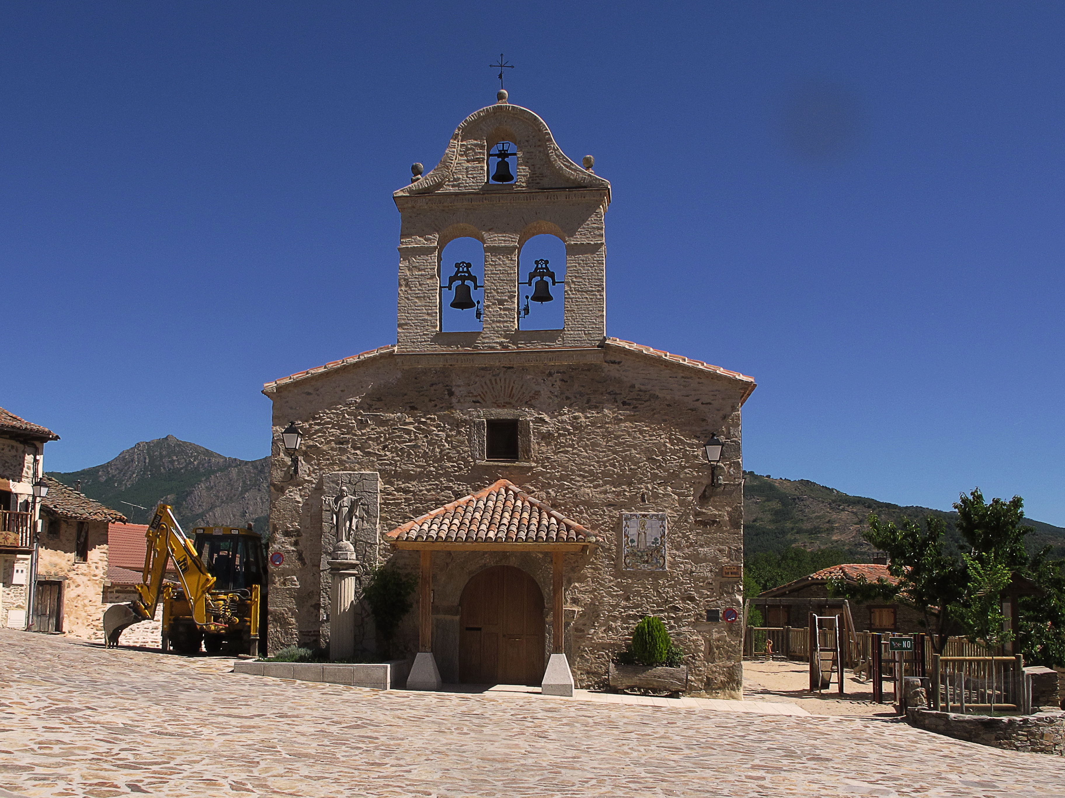 Se trata de adivinar el lugar de la fotografia..... La iglesia de la aldea de La Hiruela, se encuentra situada en la Sierra Norte de la ciudad de Madrid, llamada la Iglesia Parroquial de San Miguel Arcángel que es el santo a quien está dedicada. El edificio de estilo barroco,pudo levantarse sobre otra anterior. Es un edificio de mampostería y piedra siglo XVII y se remata con con su espadaña 3 de huecos para tres campanas. Su construcción es sencilla y se enmarca dentro de la arquitectura autóctona tradicional de la zona, pero casi parece una iglesia mexicana. El interior es de una sola nave y posee un arco triunfal de medio punto. Teniendo en cuenta los problemas estructurales que a los afligidos estaban hechos de profunda renovación en el año 2007, durante la cual se encontraron los pequeños frescos en el ábside. En la plaza exterior fusionar las dos calles principales del pueblo. Muy recomendado visitar esta iglesia que cuenta con una arquitectura hermosa.